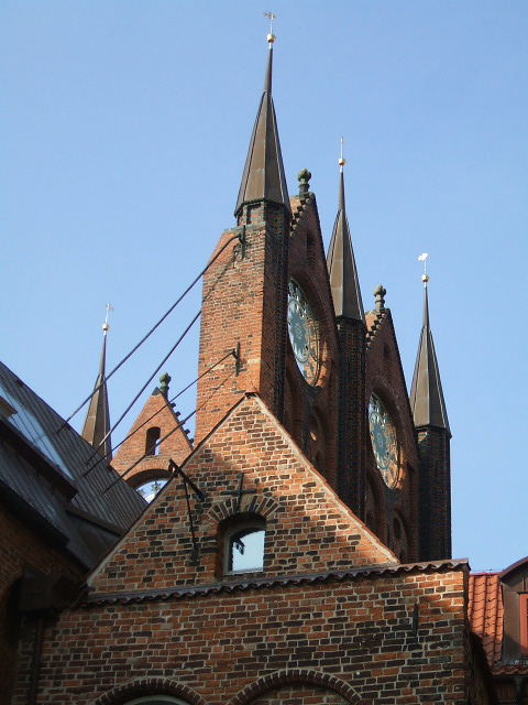 Stralsund,_Germany,_Rathaus,_Schaugiebel_von_hinten_(2006-09-29)